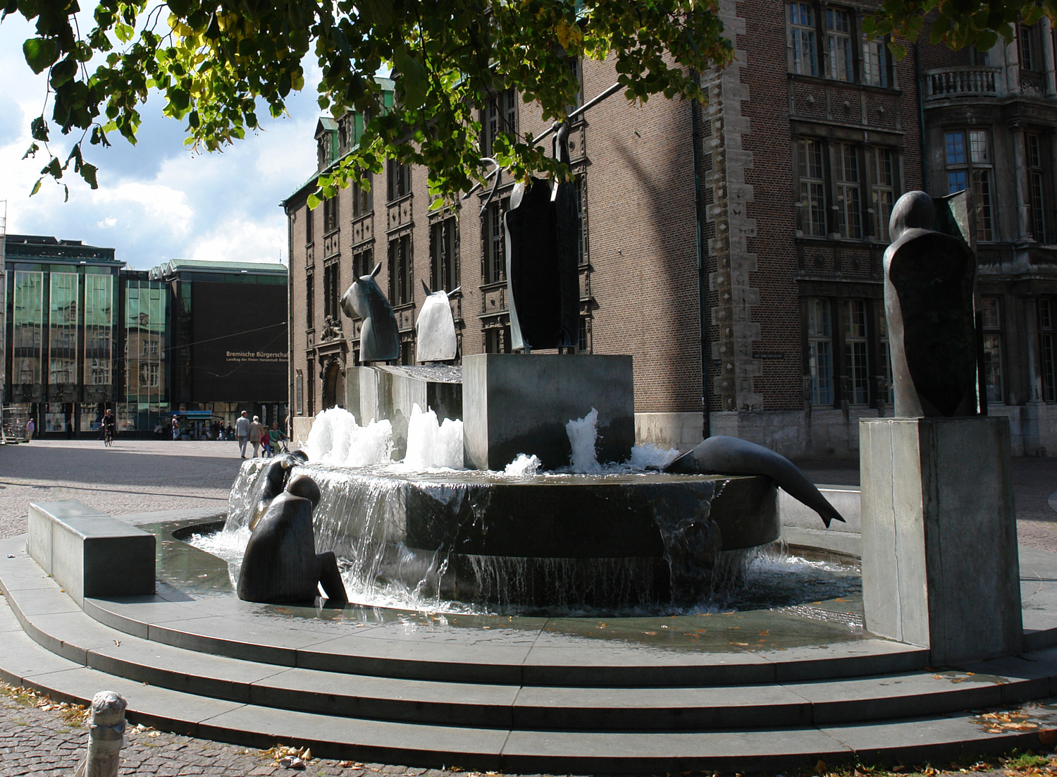 Neptunbrunnen auf dem Domshof in Bremen. Entworfen von Waldemar Otto. k: kunst im öffentlichen raum bremen